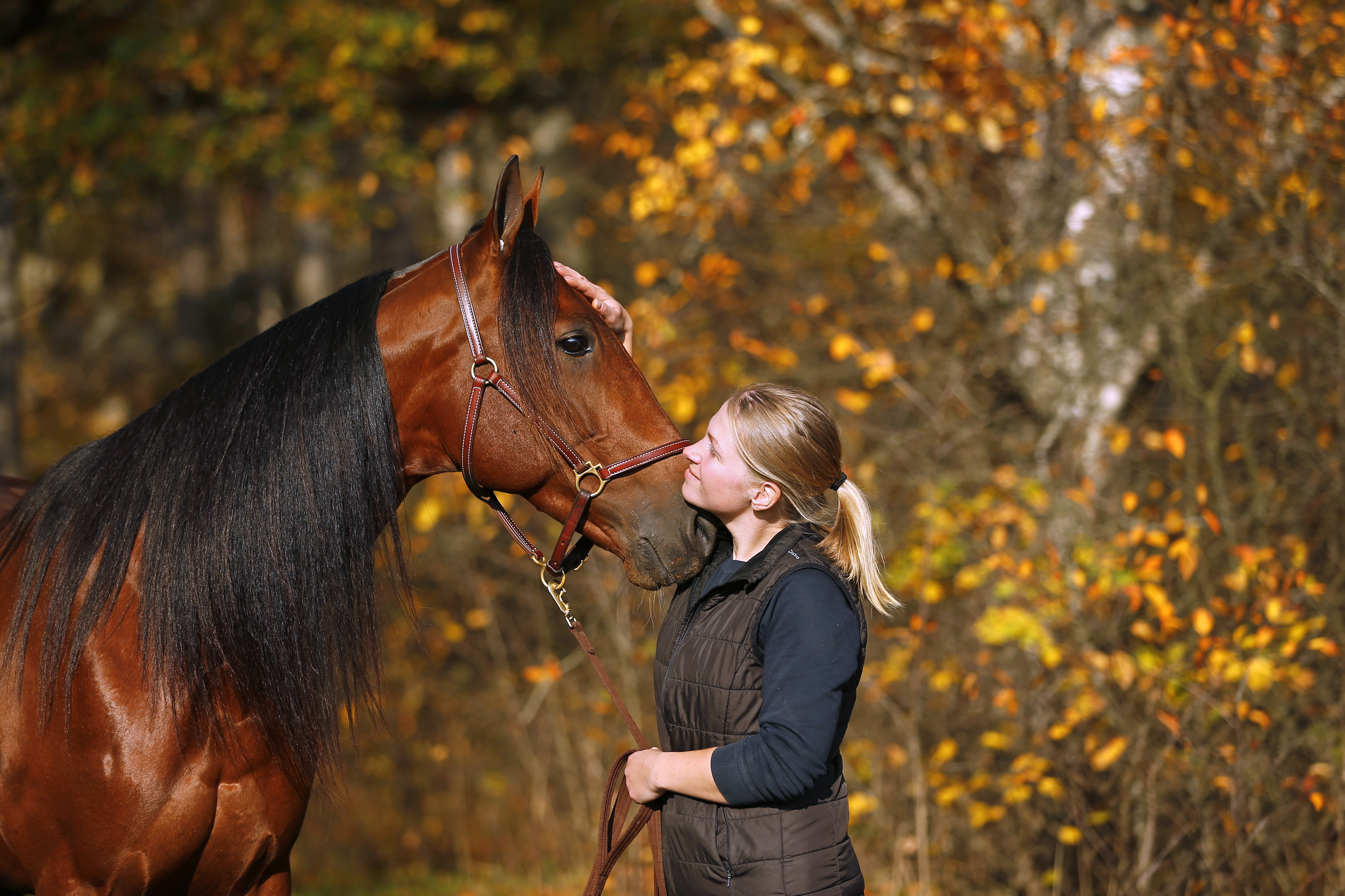 Foto: Maria Holmén/TR bild.Jordanstorp Säteri 20181017..Hästar hos Timo Nurmos..Readly Express med sin skötare Inga Perk